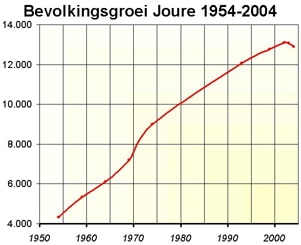 Eigen afbeelding over bevolkingsgroei in Joure tussen 1954 en 2004.